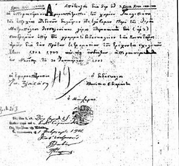 Документ на гръцкото училище в Голешани, подписан от епитроп Йоанис Златанис и учител Атанасиос Диамандис.